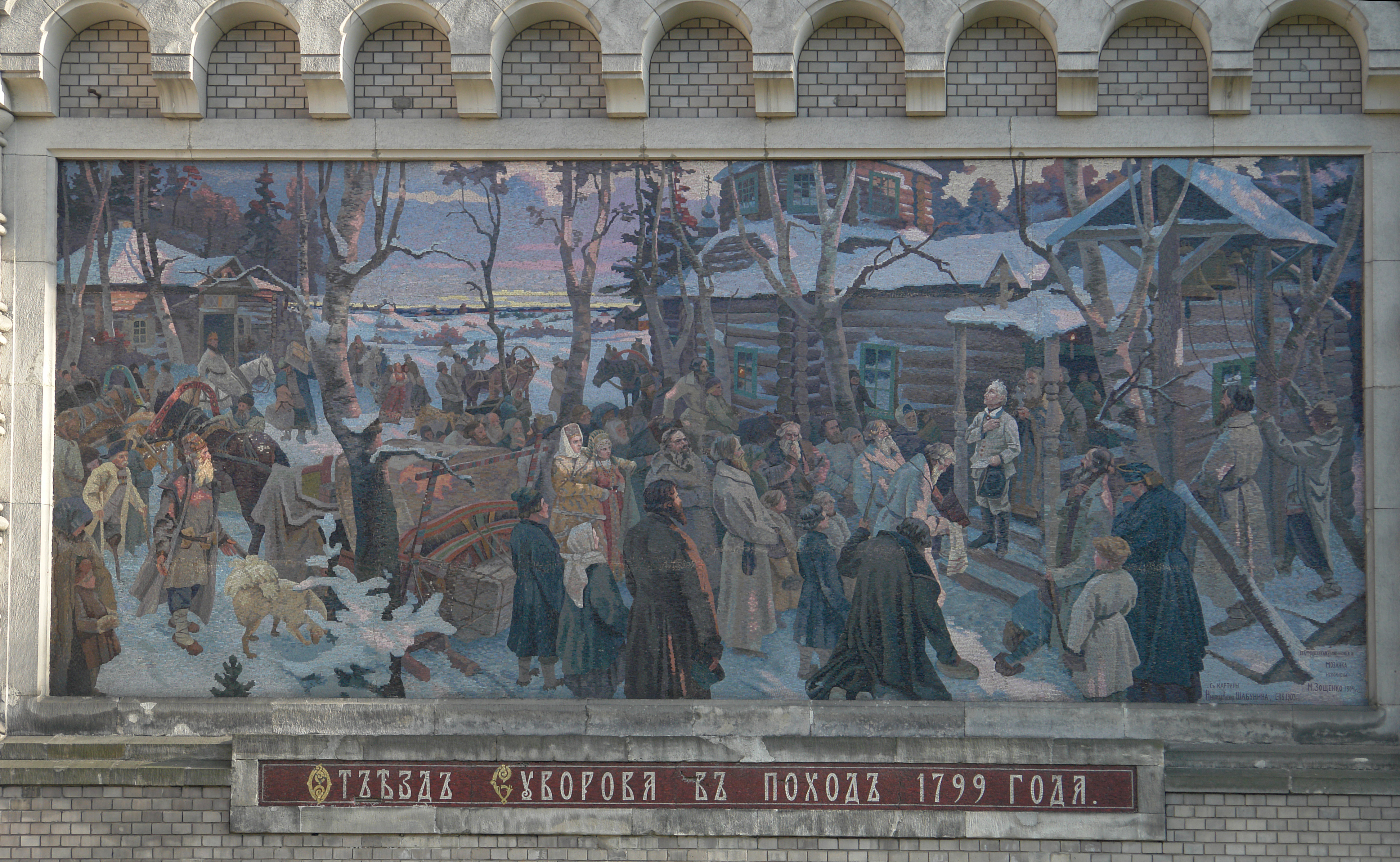 Фасад Государственного мемориального музея А.В. Суворова, мозаика «Переход Суворова через Альпы в 1799 г.», мозаичист М.И Зощенко; по эскизам художника Н. А. Шабунина "Отъезд Суворова в поход 1799 года". 1904-1904 гг. (Кирочная улица 43, Санкт-Петербург, Россия)